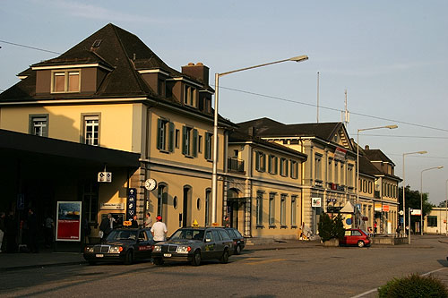 Solothurn: Hauptbahnhof